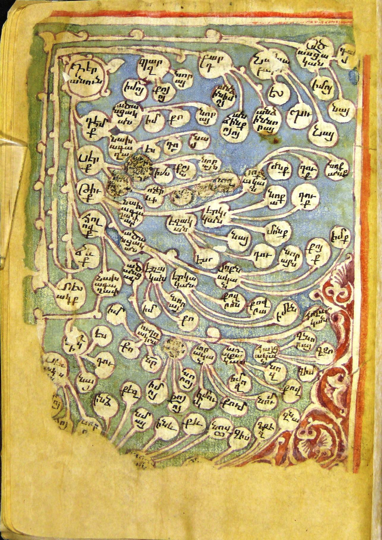 Armenian linguistic manuscript